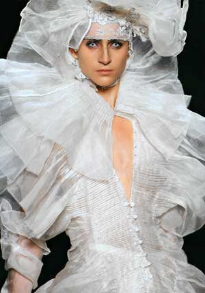 Carol Pantoliano desfilando para Lino Villaventura